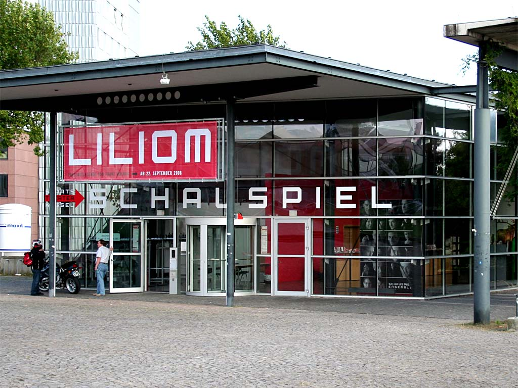 Eingangsbereich der documenta Halle in Kassel am 30. September 2006 Photograph: David Brueckmann